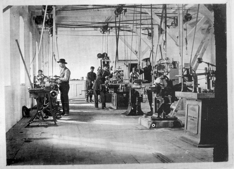 Радионица војнотехничког застава око 1910 (Данашња Застава Оружје)